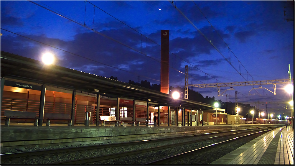 Estación de tren de Castellbisbal.